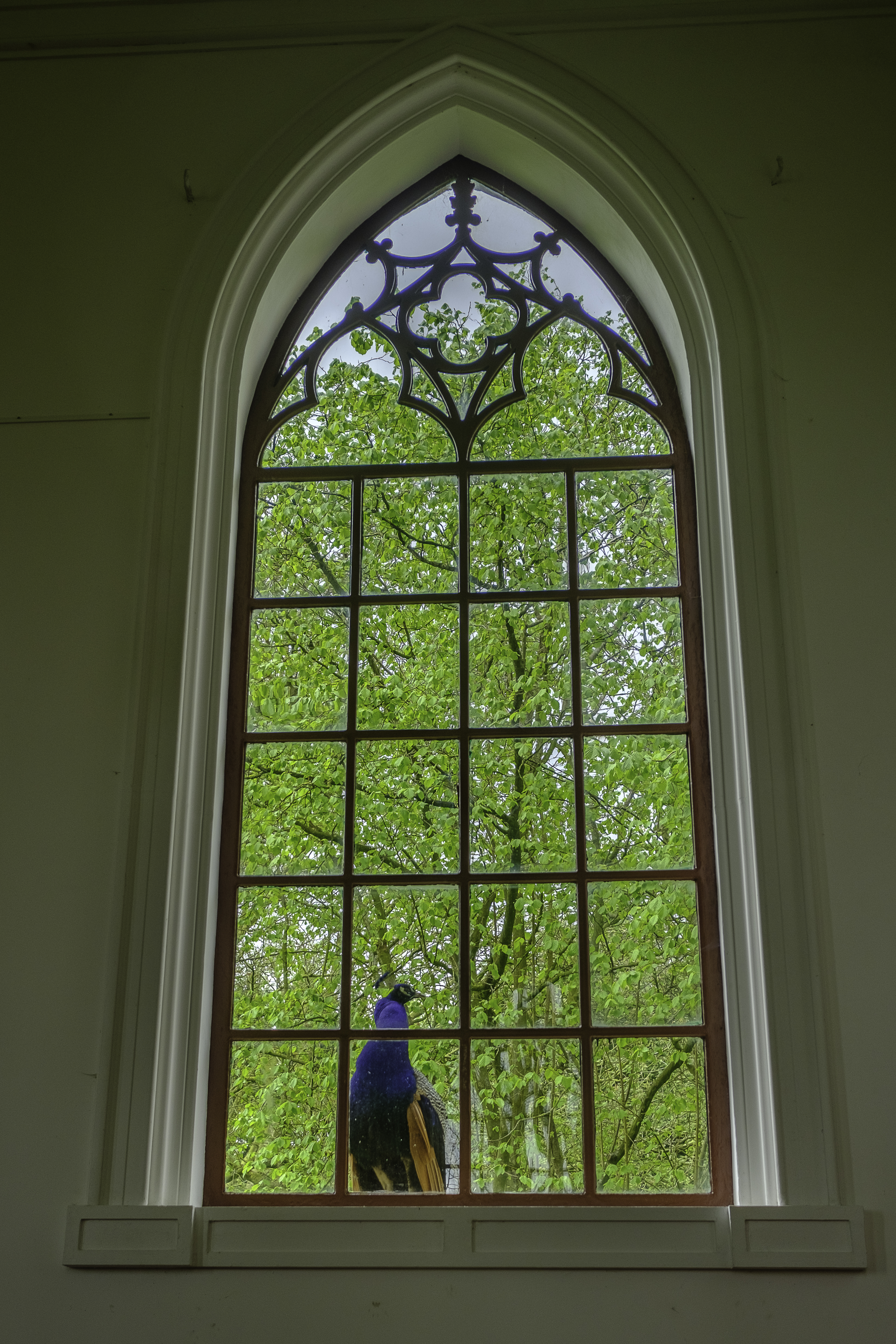 Venster in de kerk van Wittewierum met een pauw erachter.